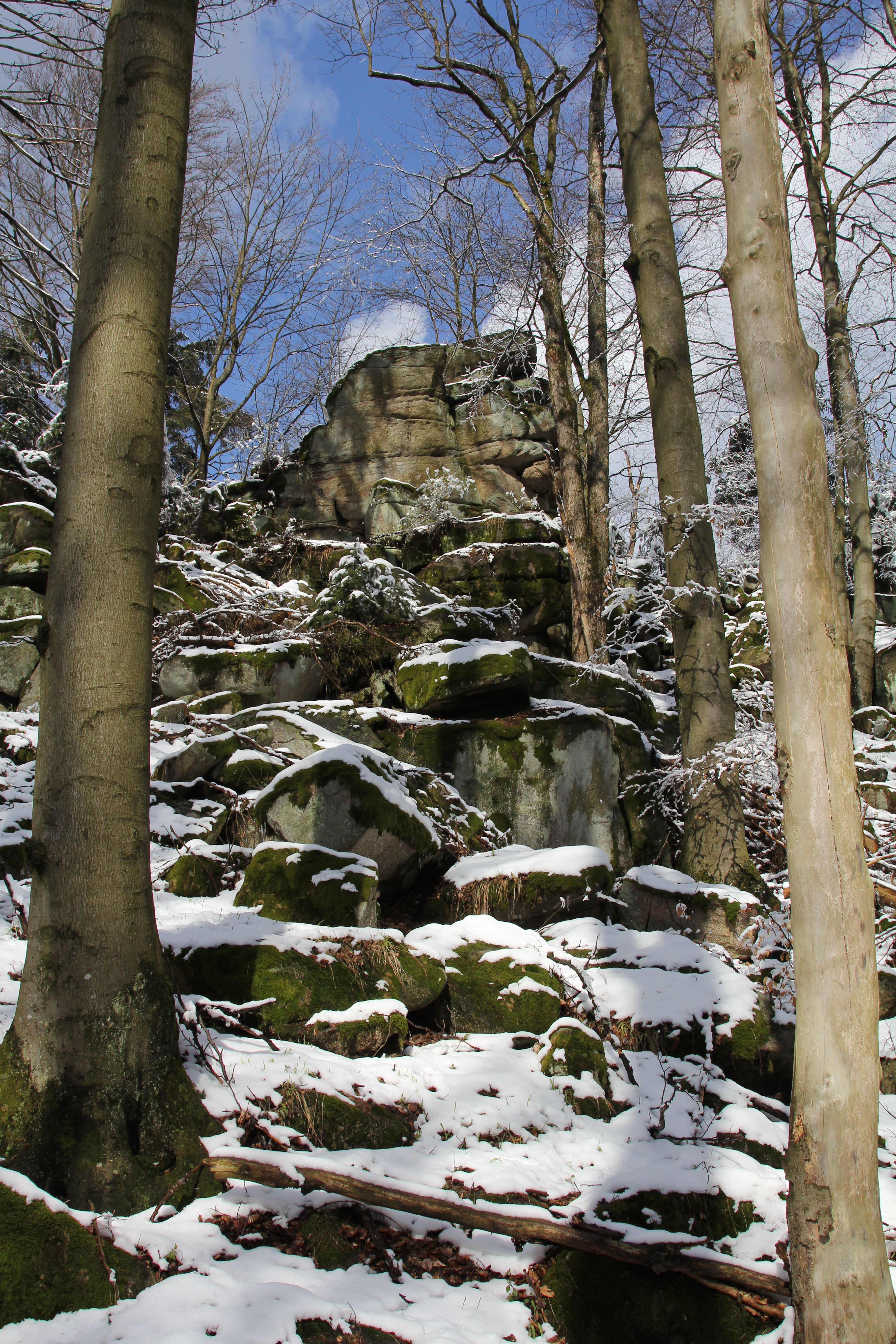 PR Vysoký kámen